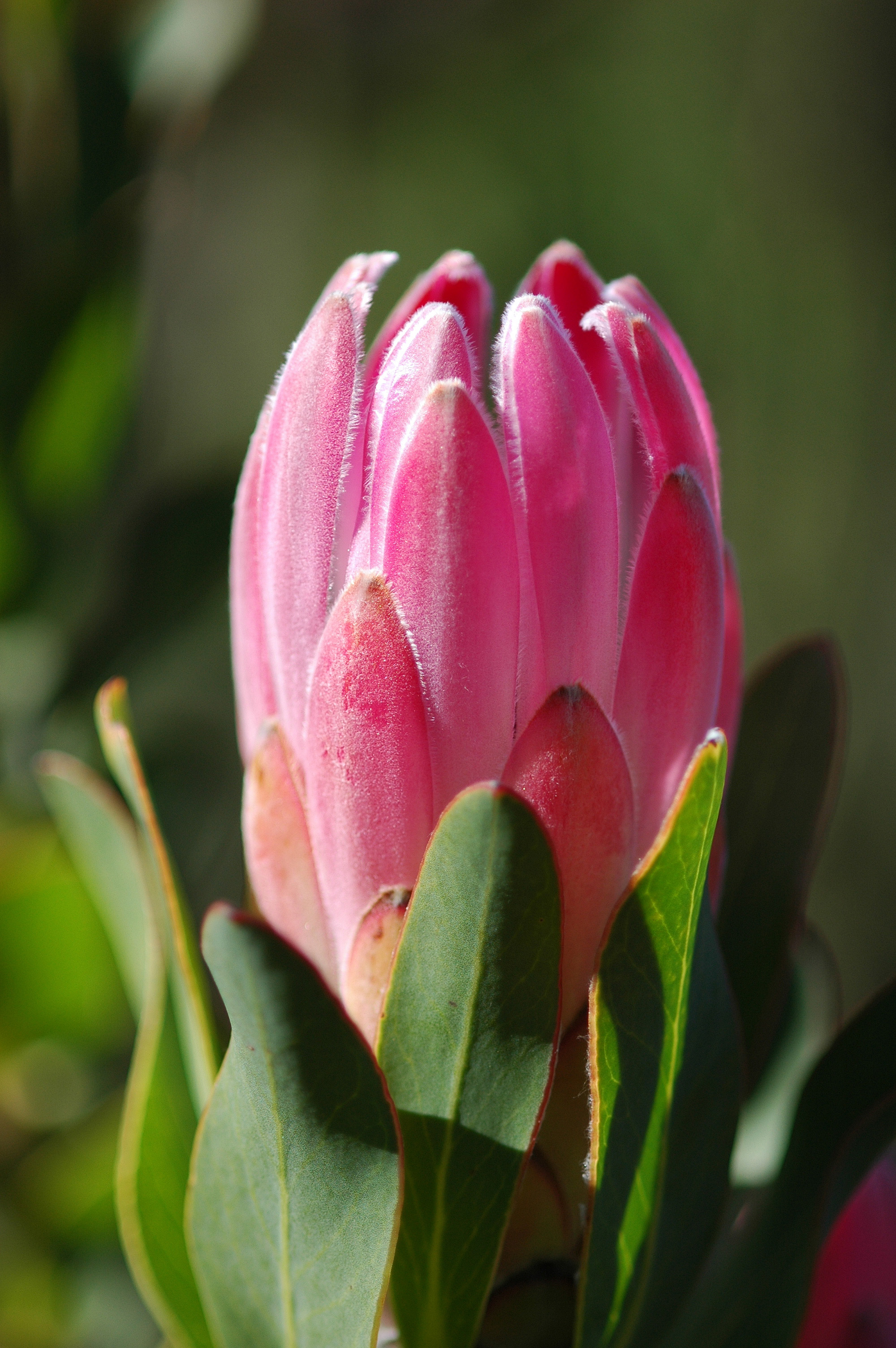 Protea compacta, fotografiert in Südafrika